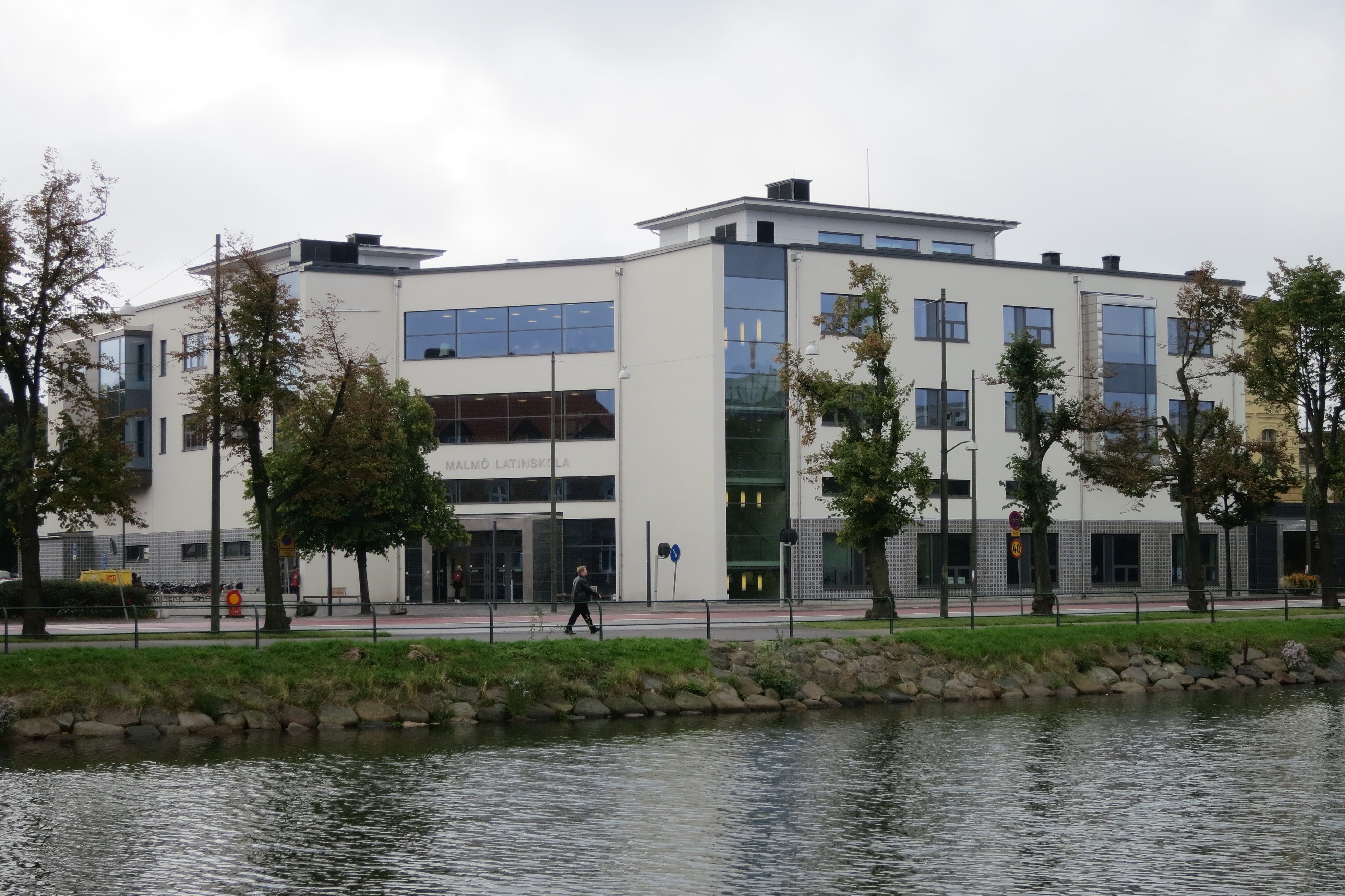 Malmö Latinskola, tillbyggnaden 2014